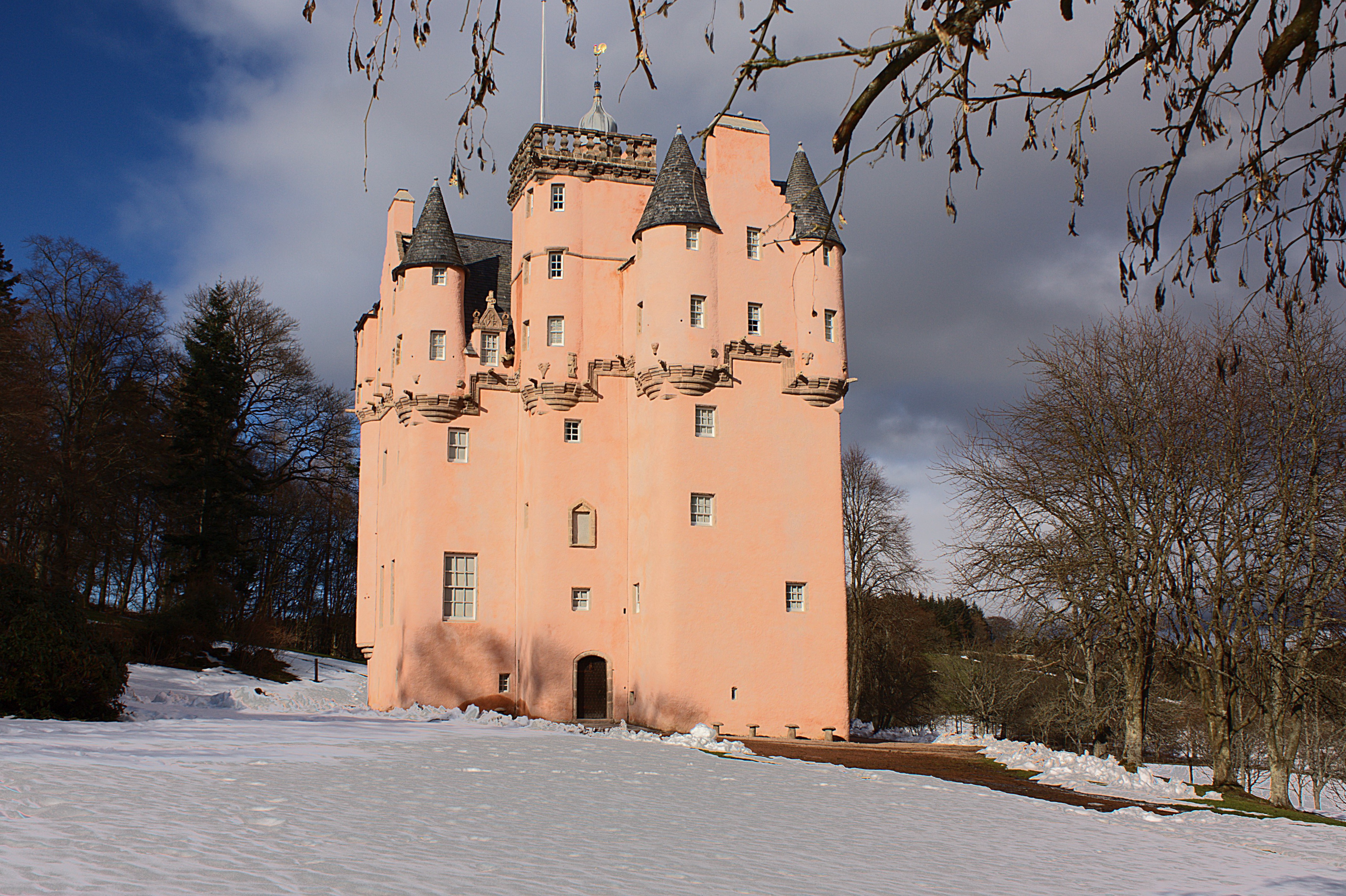 Craigievar Castle.